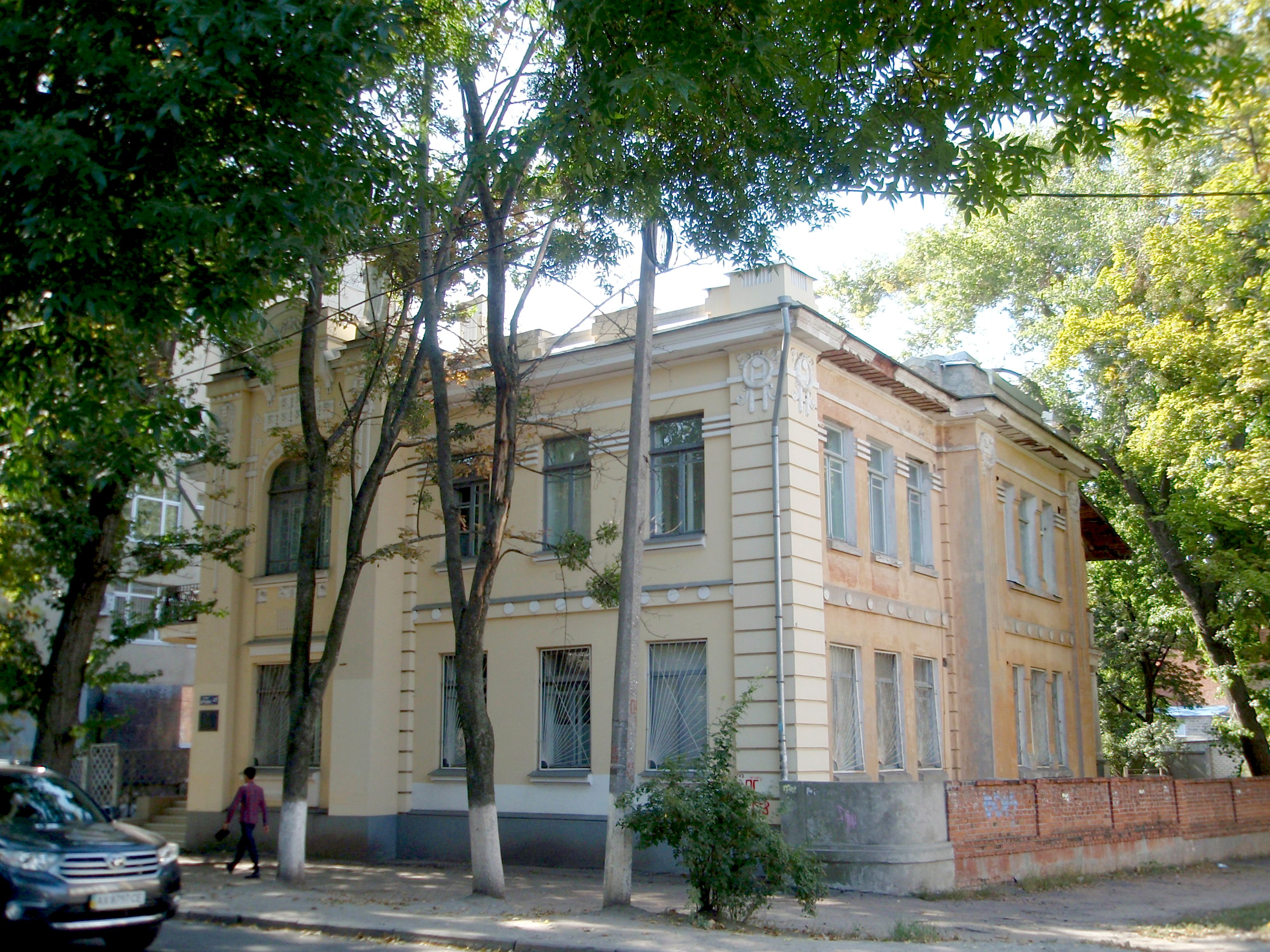 Особняк, Харків, вул. Артема, 47